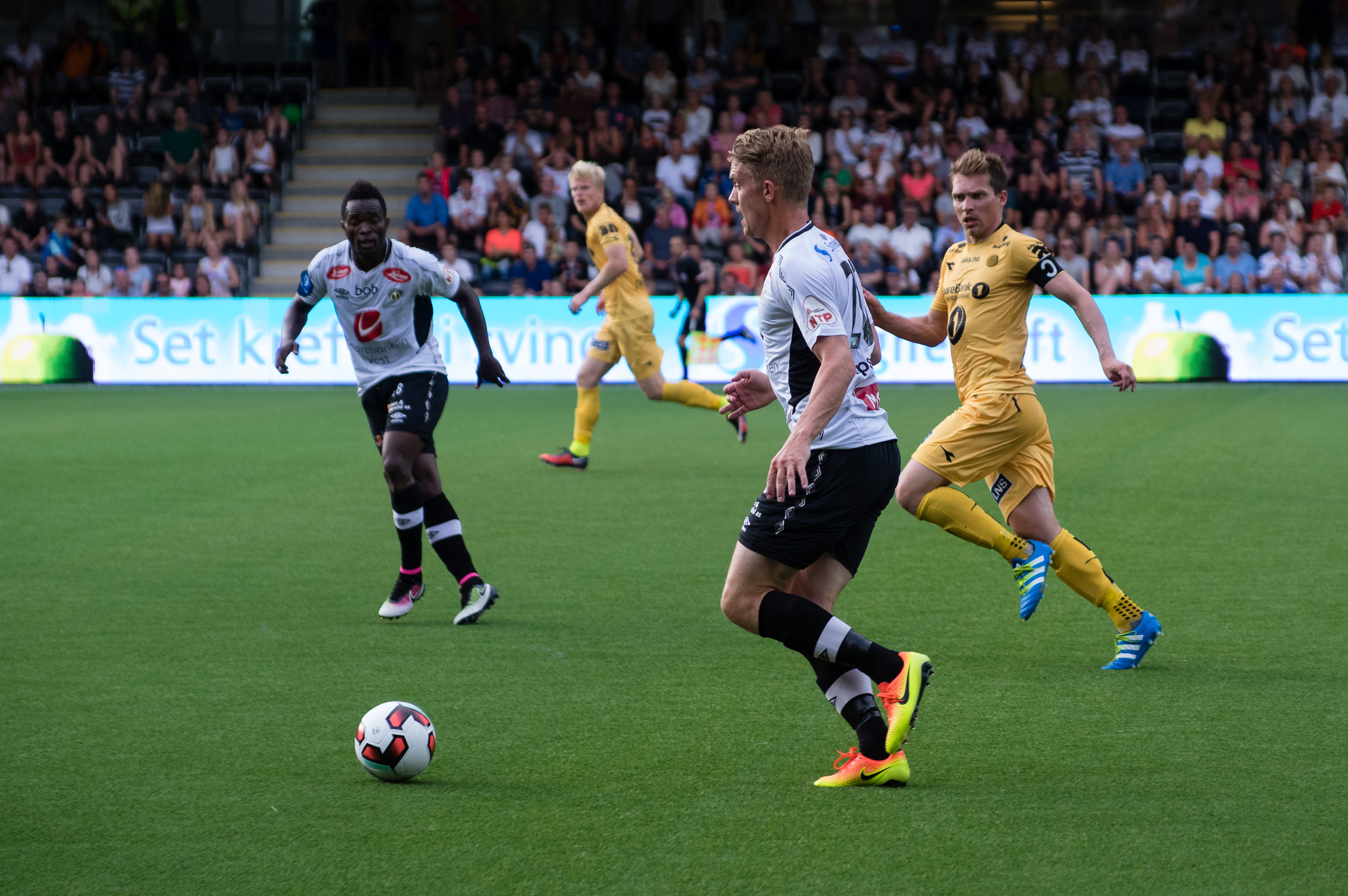 Kristian Fardal Opseth scora 1-2-målet mot Bodø-Glimt 24. juli 2016.